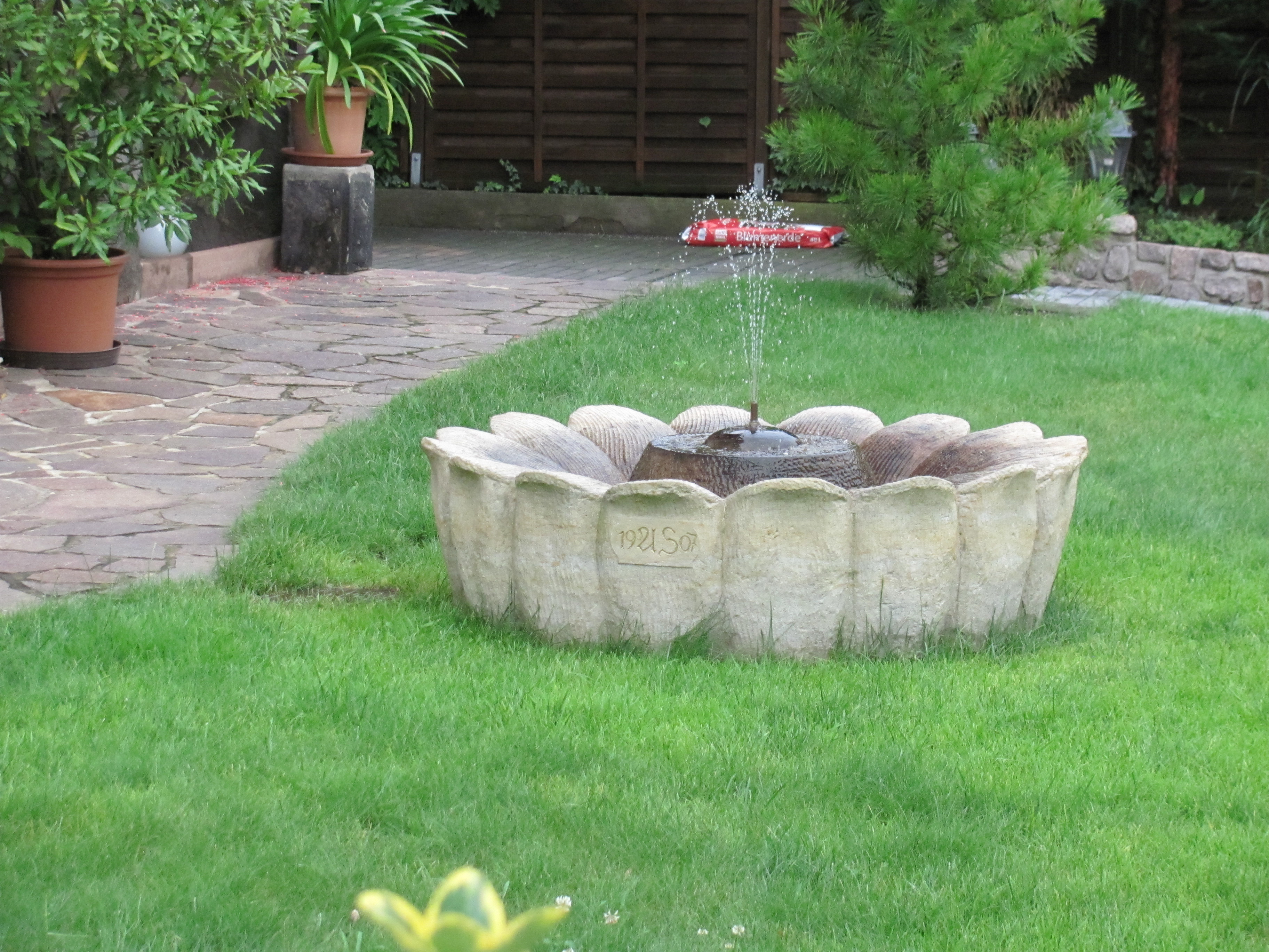 Radebeul-Niederlößnitz, Villa Alfred Sparbert, Blütenbrunnen